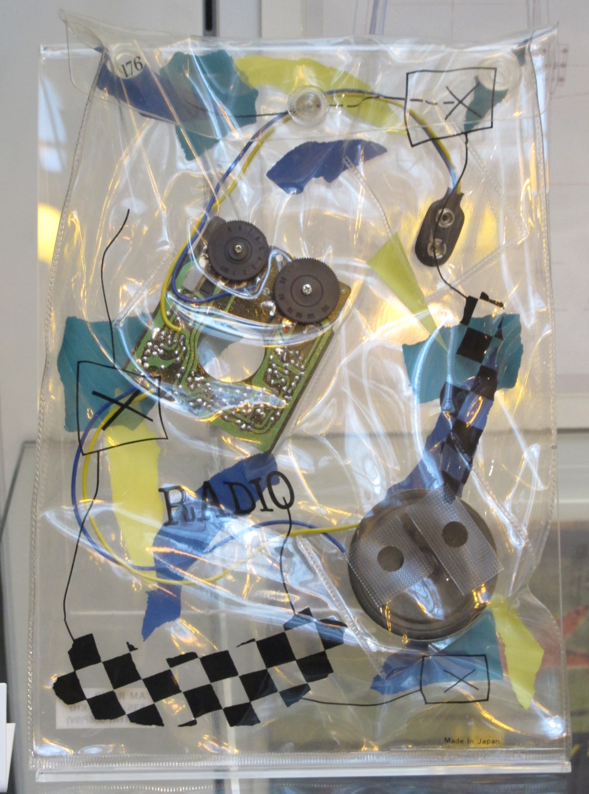 Radio in busta, daniel weil, produzione giapponese 1981